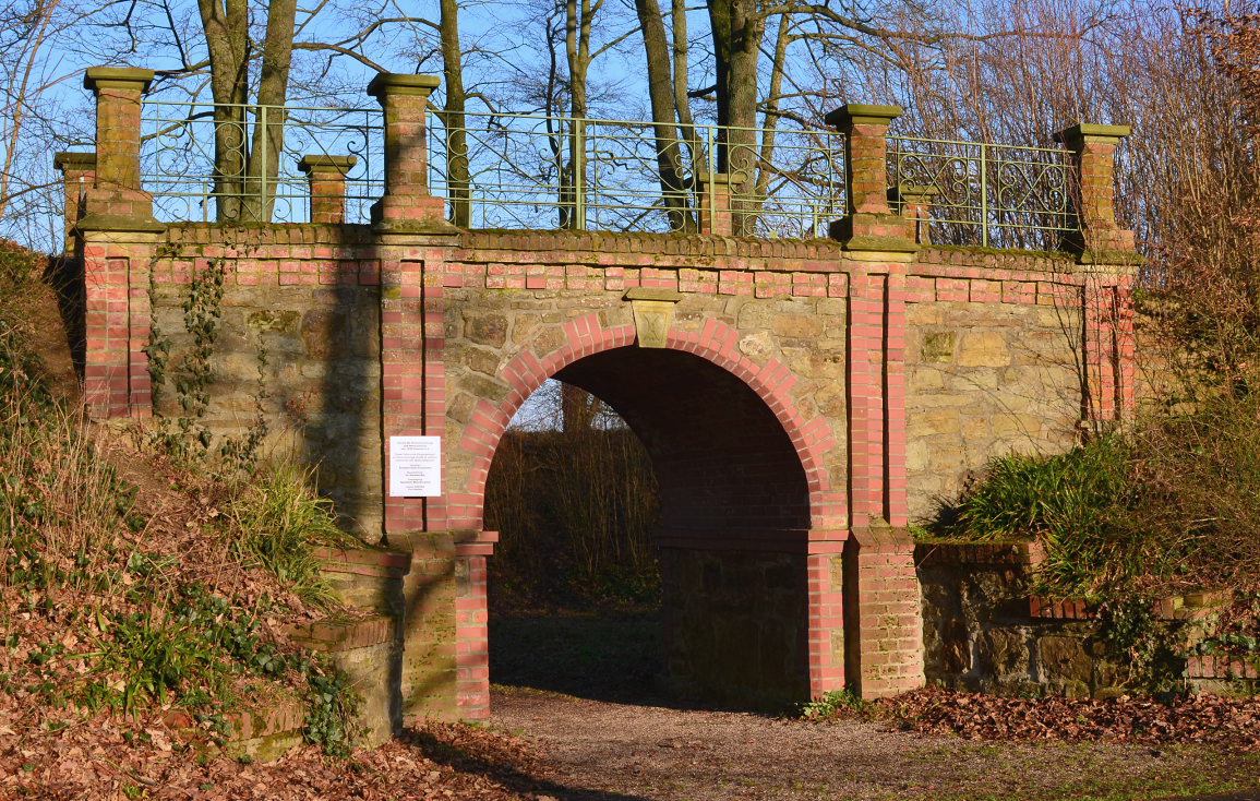 Befestigungsanlagen auf dem Klüt, Torbogen am Eingang zum Kommandantenhaus mit Brunnen